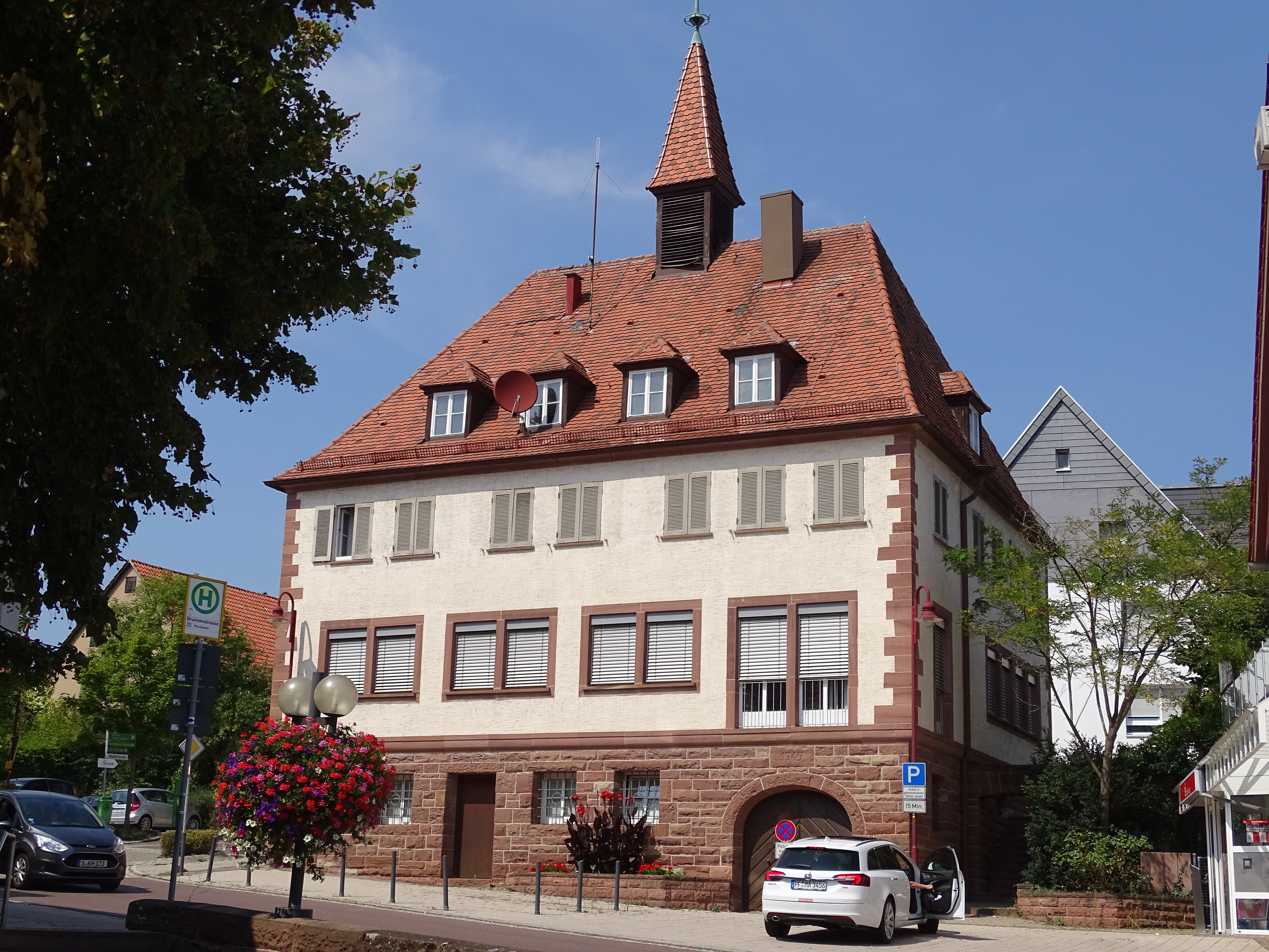 Rathaus Heimsheim